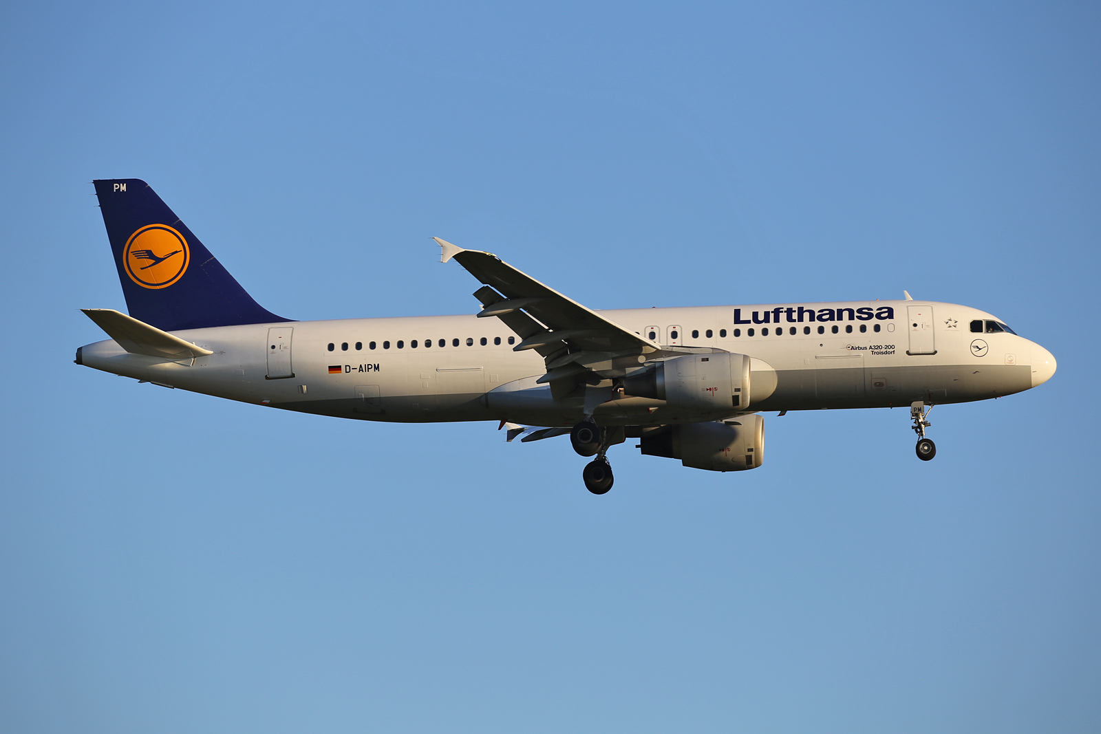 Frankfurt am Main (Rhein-Main AB) (FRA / EDDF / FRF) Germany 8.2016